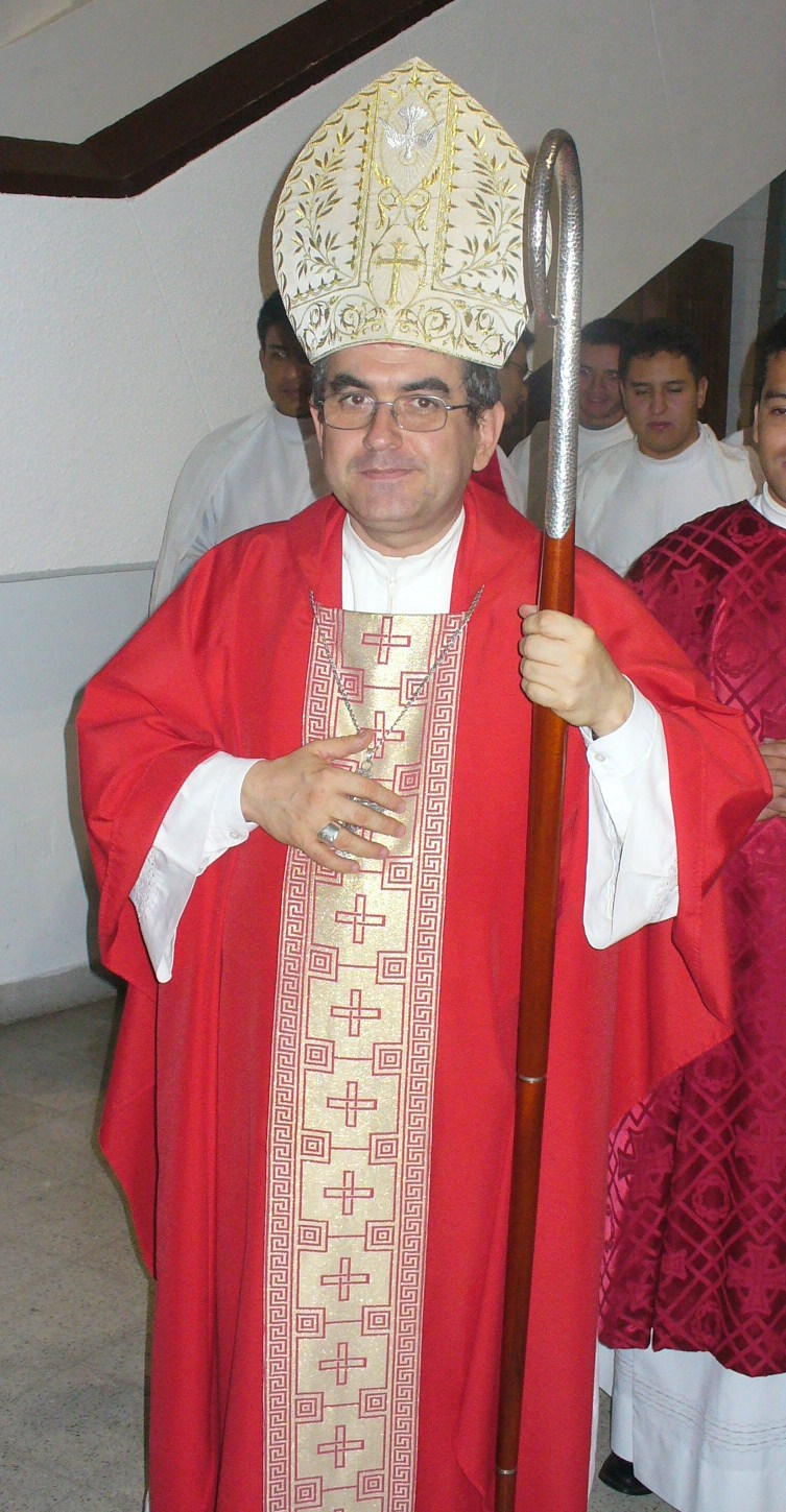 Monseñor Víctor Manuel Ochoa Cadavid obispo de la diócesis de Málaga-Soatá. Colombia.